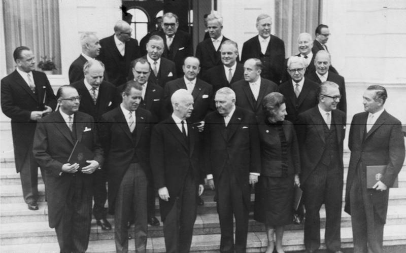 Zentralbild / Tele 18.10.1963 Die neue Bonner Regierung am 17.10.63 bei Lübke 1. Reihe vlnr: Dr. Rolf Dahlgrün (FDP), Finanzminister; Dr. Gerhard Schröder (CDU), Aussenminister; Heinrich Lübke, Bundespräsident; Ludwig Erhard (CDU), Bundeskanzler; Dr. Elisabeth Schwarzhaupt (CDU), Gesundheitsminister; Kai-Uwe von Hassel (CDU) Verteidigungsminister; Dr. Erich Mende (FDP), Vizekanzler und Gesamtdeutscher Minister 2. Reihe vlnr: Walter Scheel (FDP), Minister für wirtschaftliche Zusammenarbeit; Richard Stücklen (CSU), Postminister; Hermann Höcherl (CSU), Innenminister; Dr. Werner Dollinger (CSU), Schatzminister; Hans Krüger (CDU), "Vertriebenen"-Minister; Werner Schwarz, (CDU), Ernährungsminister 3. Reihe vlnr: Paul Lücke (CDU), Wohnungsminister; Dr. Bruno Heck (CDU), Familienminister; Alois Niederalt (CDU), Bundesratsminister; Kurt Schmücker (CDU), Wirtschaftsminister; Dr. Hans Seebohm (CDU), Verkehrsminister 4. Reihe vlnr: Theodor Blank (CDU), Arbeitsminister; Hans Lenz (FDP), Wissenschaftsminister; Dr. Ewald Bucher (FDP), Justizminister; Dr. Heinrich Krone (CDU), Sonderminister.